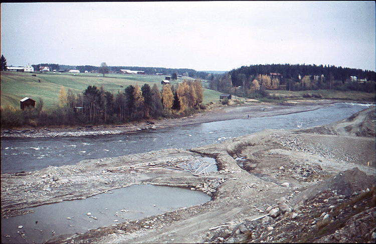 Resultatet när Marion 7400 grävt vid kraftverkskanalens utlopp i Skellefte älv vid Lund i Skellefteå. På andra sidan t v Myckle by, t h Mobacken.